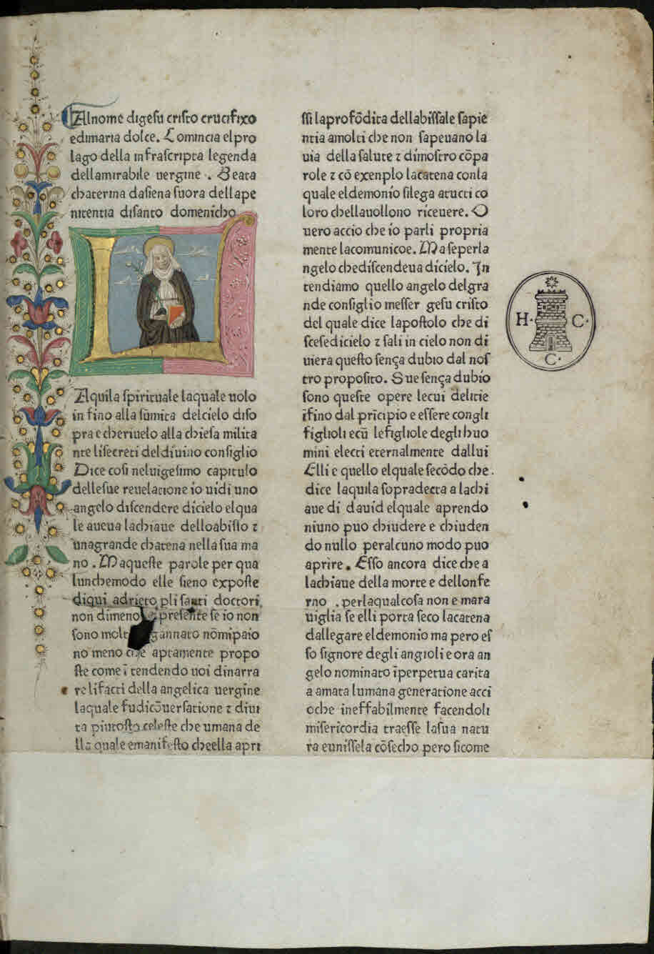 Legenda Sanctae Catharinae Senensis (italiano). - Improntata in Firençe : al monisterrio di Santo Jacopo di Ripoli … per mano di dua religiosi frate Domenico da Pistoia e frate Piero da Pisa, Anno domini mille quattrocento settantasette addi ventiquattro di março. - 160 c. ; [a-v⁸] ; 4° .